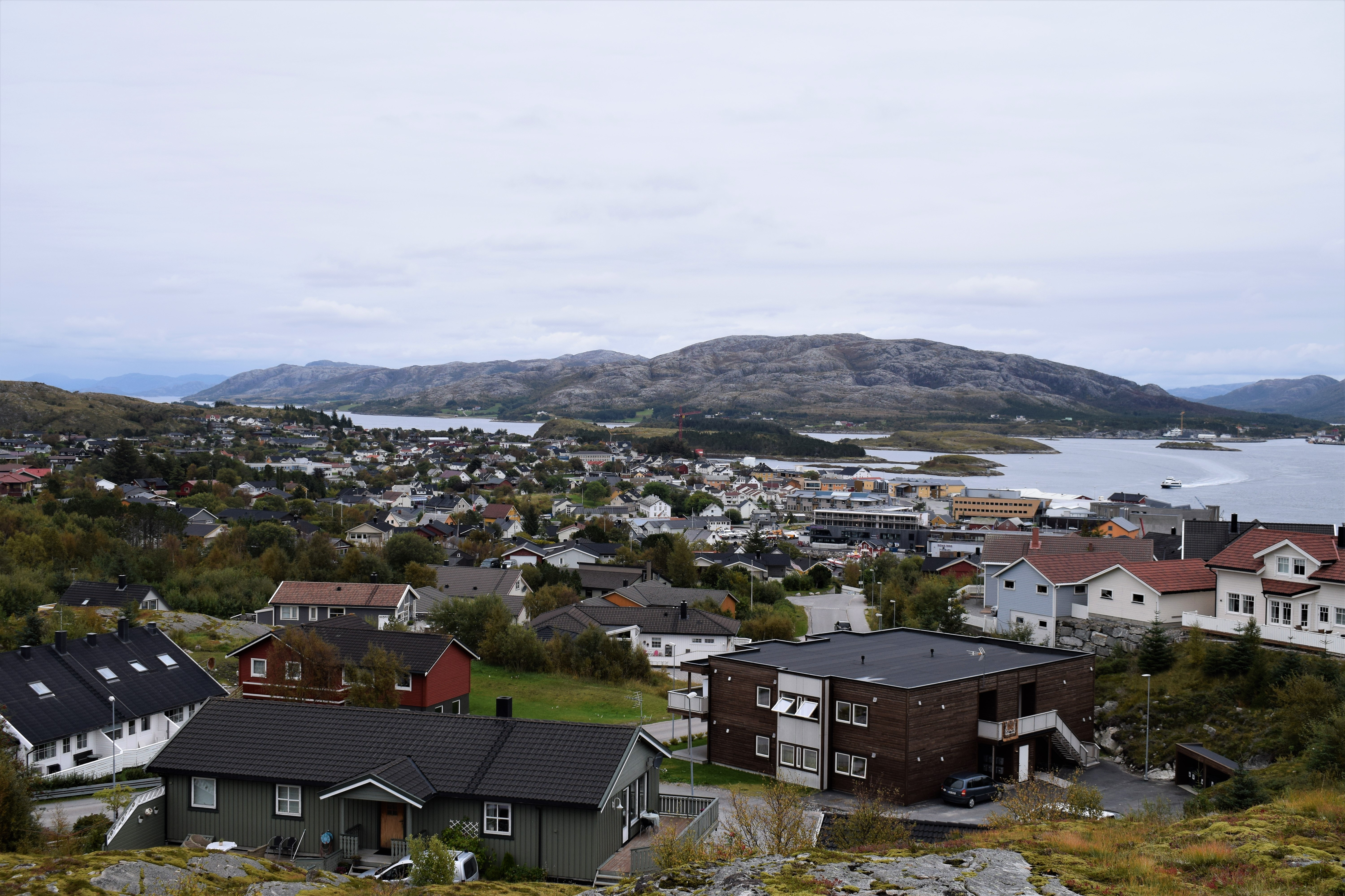 Rørvik og Nærøysundet sett i østlig retning fra Byåsen.